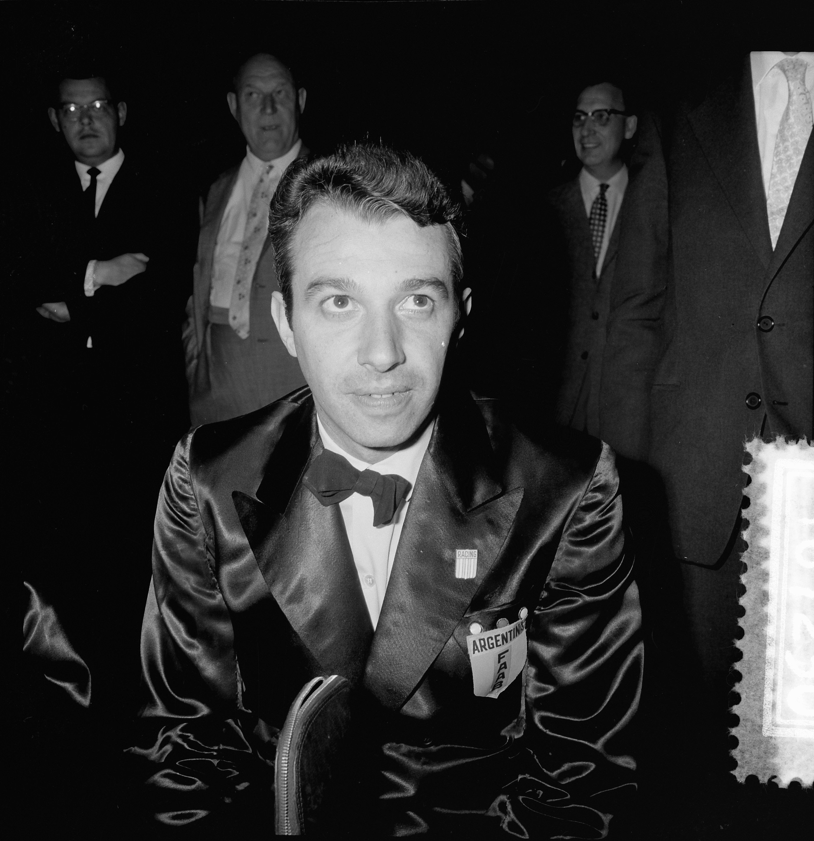 Collectie / Archief : Fotocollectie Anefo Reportage / Serie : [ onbekend ] Beschrijving : Kampioenschappen biljaren in Ostende, koppen Marcello Lopez (Argentinie) Datum : 4 augustus 1964 Locatie : Argentinië, Oostende Trefwoorden : KAMPIOENSCHAPPEN, biljarten Fotograaf : Koch, Eric / Anefo Auteursrechthebbende : Nationaal Archief Materiaalsoort : Negatief (zwart/wit) Nummer archiefinventaris : bekijk toegang 2.24.01.03 Bestanddeelnummer : 916-7230